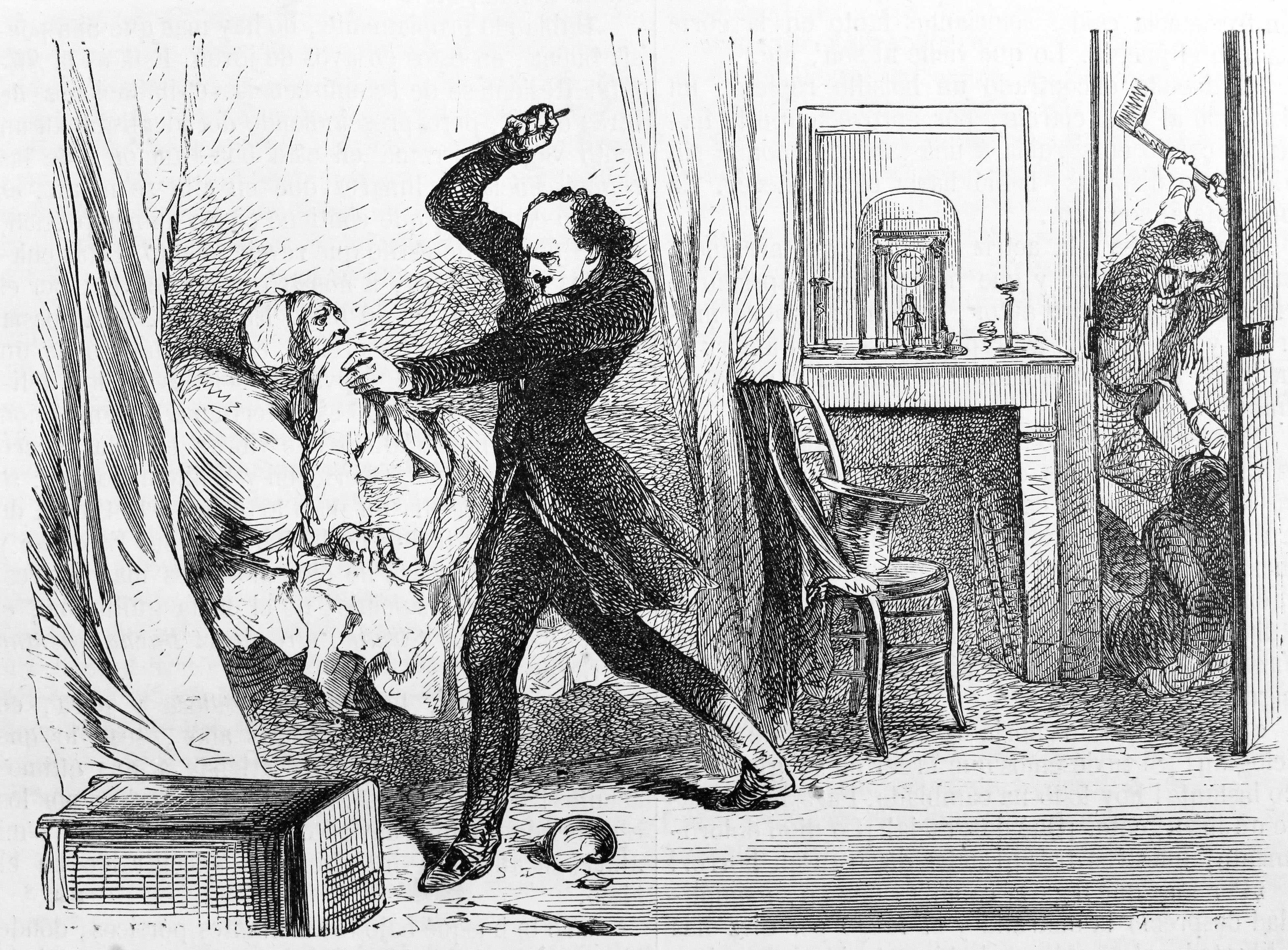 Robos y asesinatos por Lacenaire, Francois y Avril. "Asesinato del pasage del Caballo-Rojo." Ilustraciones de la obra : Anales dramáticos del crimen ó Causas célebres españolas y estranjeras [sic] / estractadas [sic] de los originales y traducidas, bajo la dirección de José de Vicente y Caravantes. - Madrid : Imprenta de Fernando Gaspar [etc.], 1858-1866. - Ed. il. con grabados...